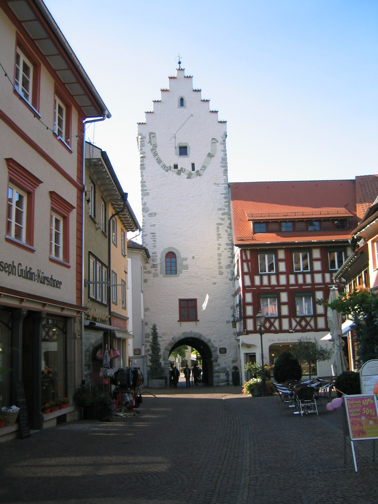 Untertor in Markdorf